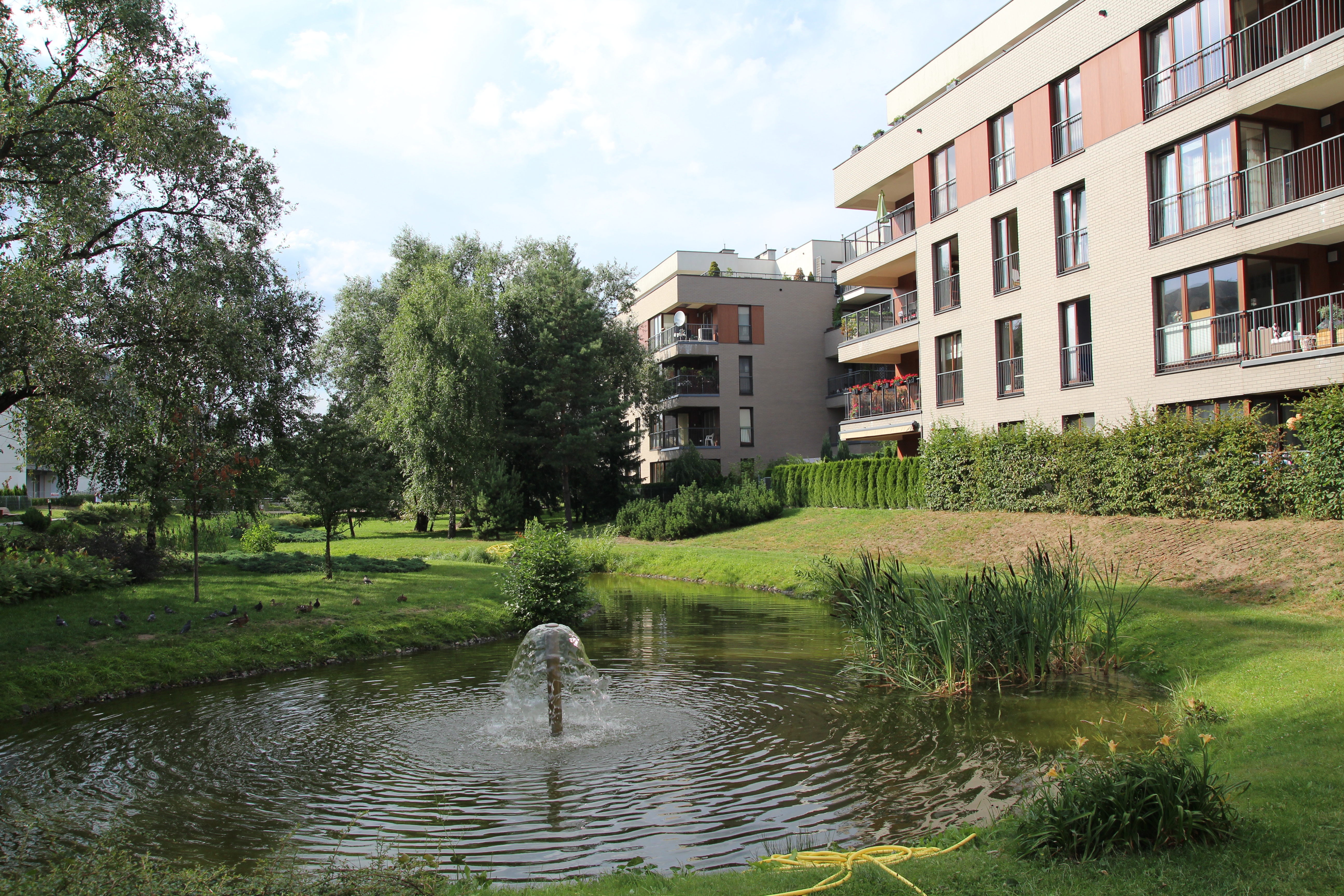 Ostoja Wilanow